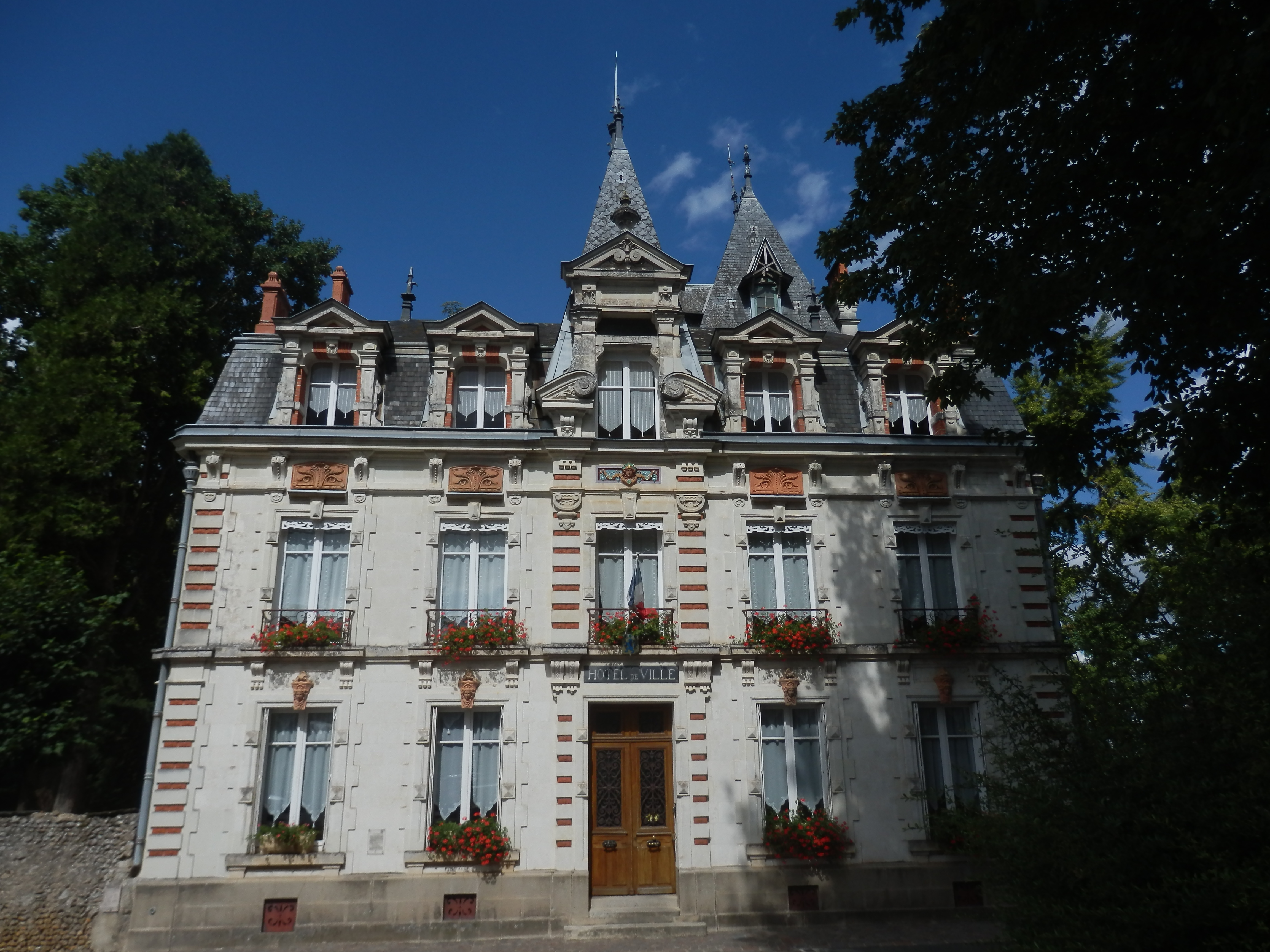 Façade ouest de l'Hôtel de ville.